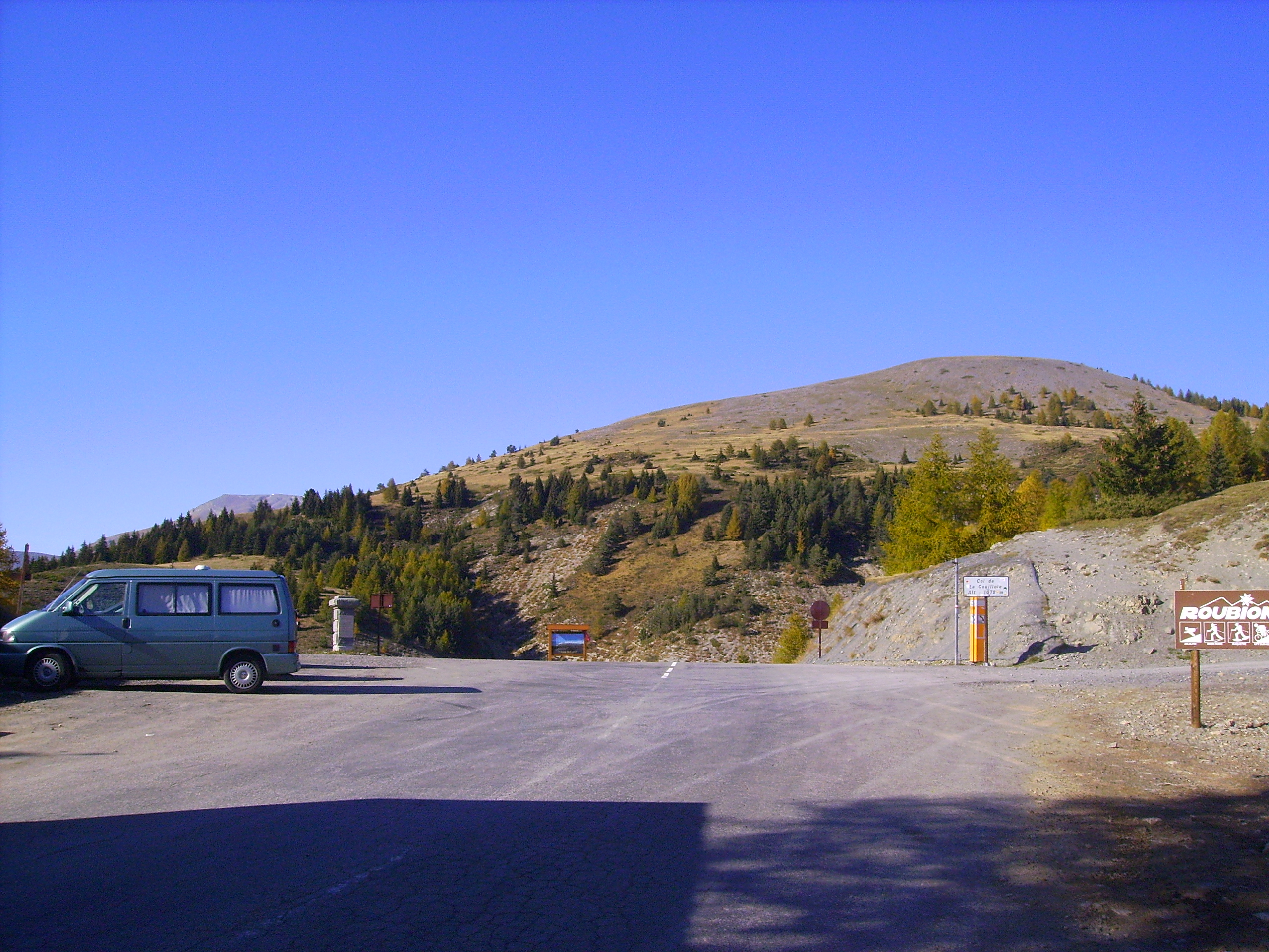 Col de la Couillole